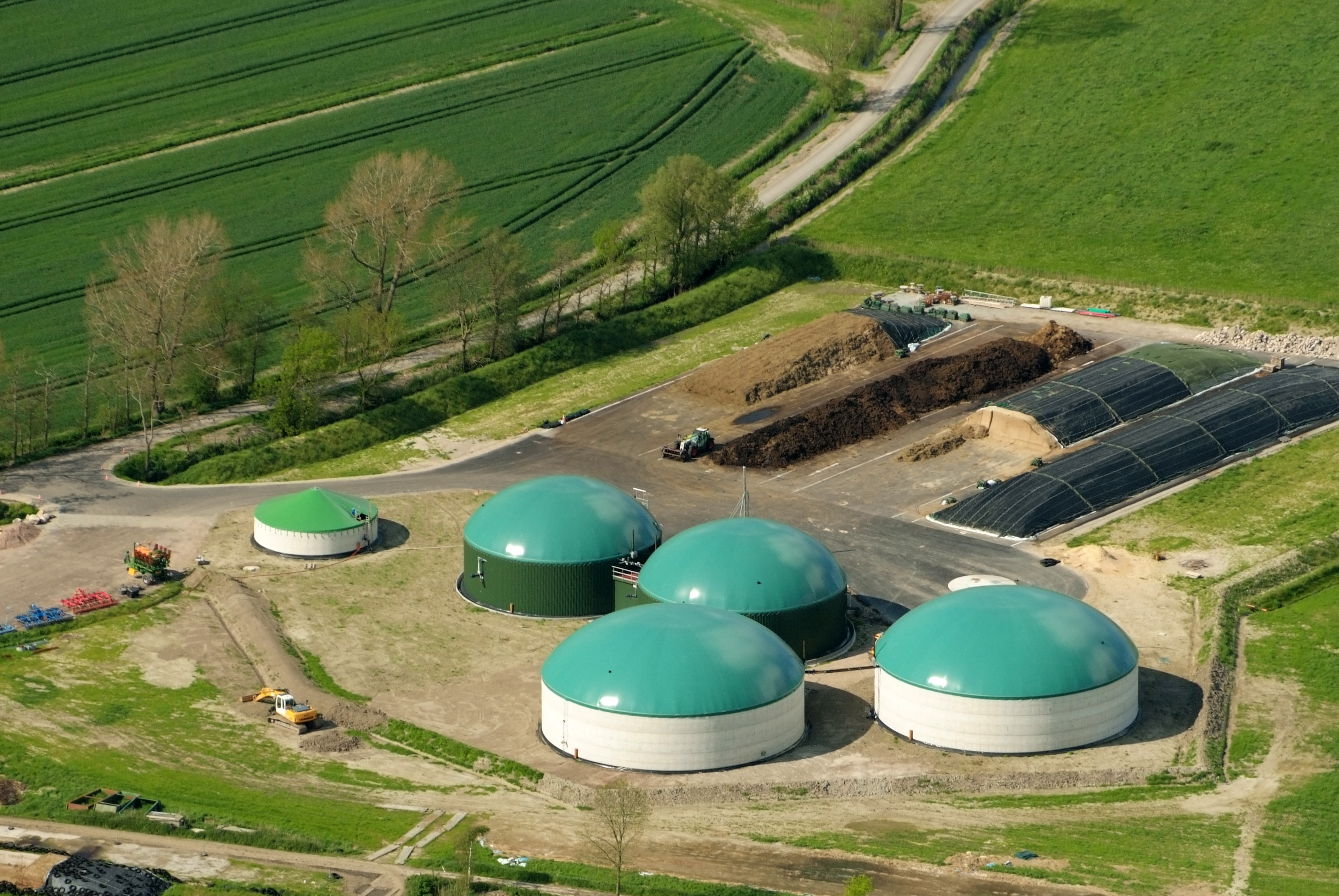 Fotoflug vom Flugplatz Nordholz-Spieka über Bremerhaven, Wilhelmshaven und die Ostfriesischen Inseln bis Borkum